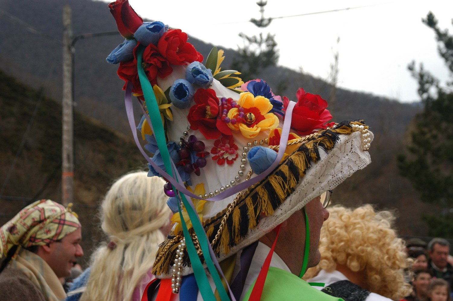 En Polaciones es famoso su Carnaval de los Zamarrones © jlgomezlinares